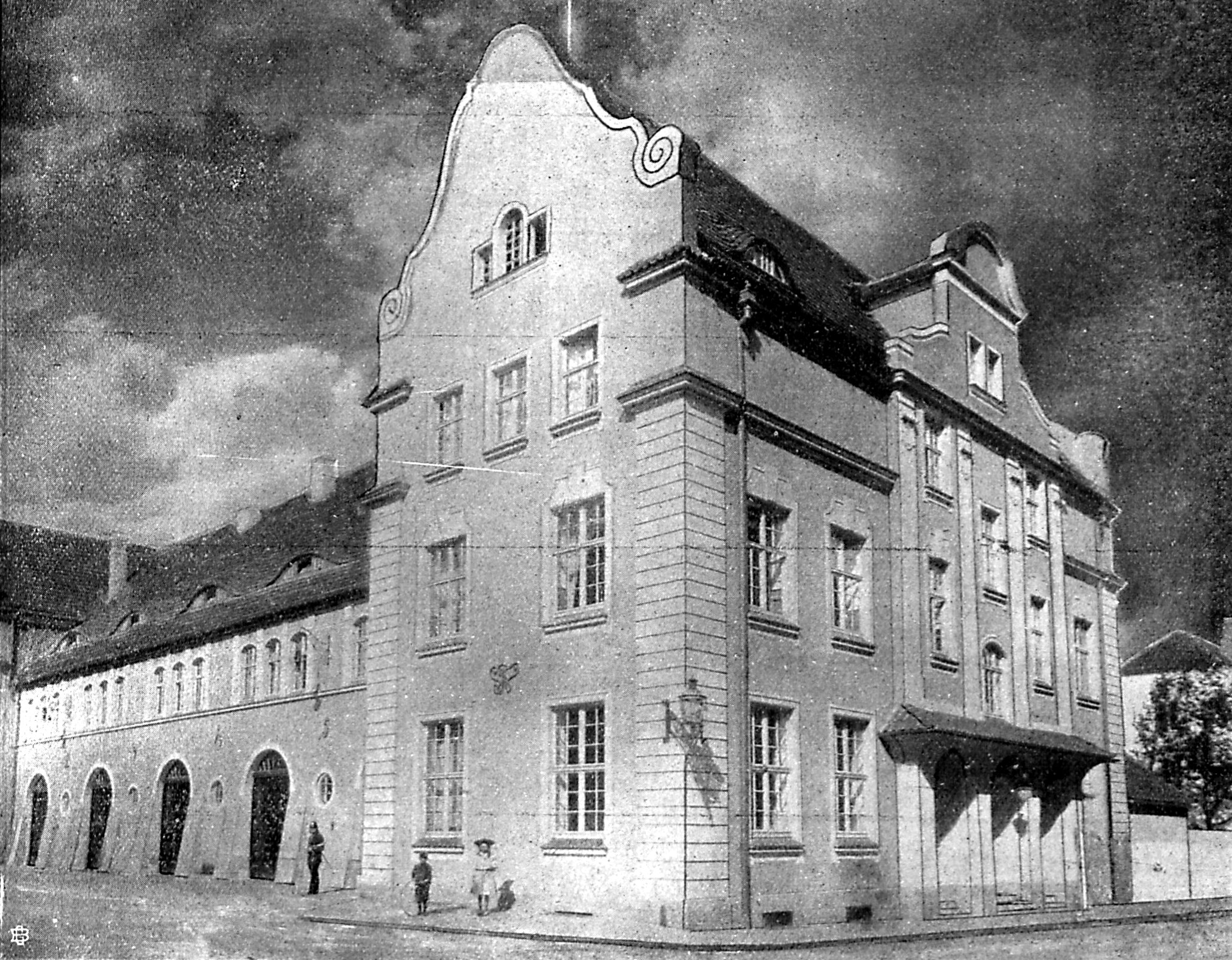 Außenansicht der neuen Hauptfeuerwache